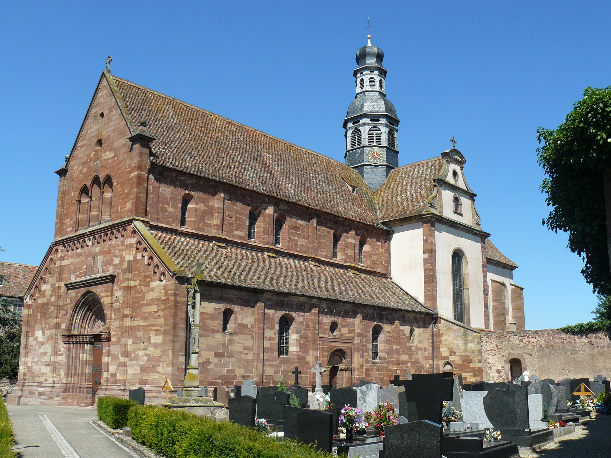 Église Saint Cyriaque, ancienne abbaye bénédictine d'Altorf